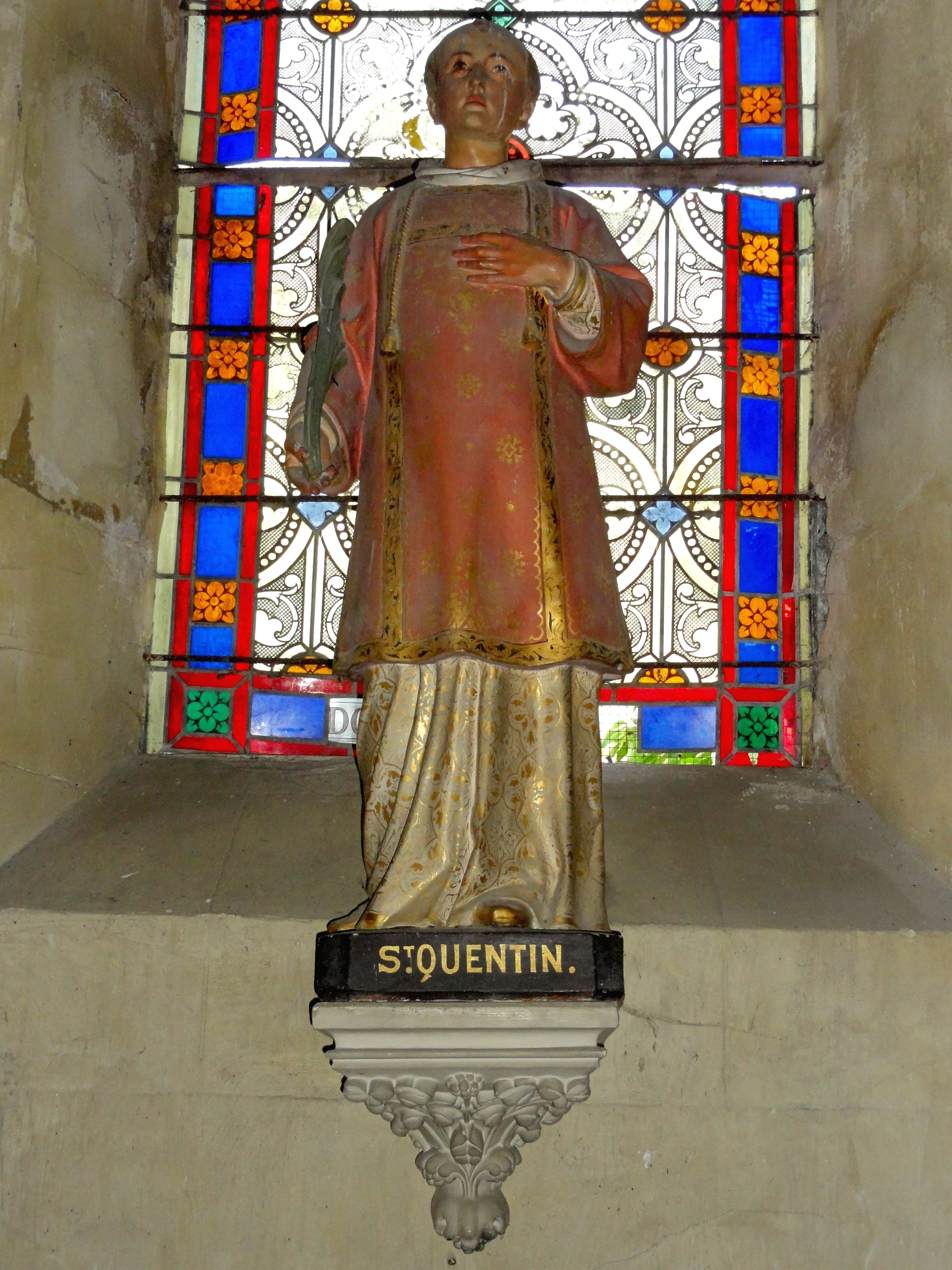 Statue de saint Quentin, patron de la paroisse.